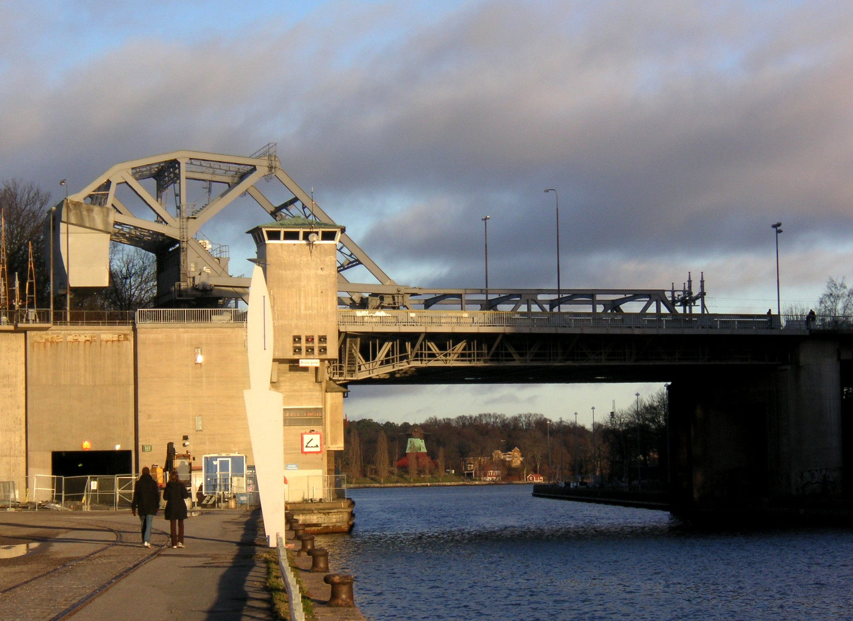 Danvikstullsbron i Stockholm